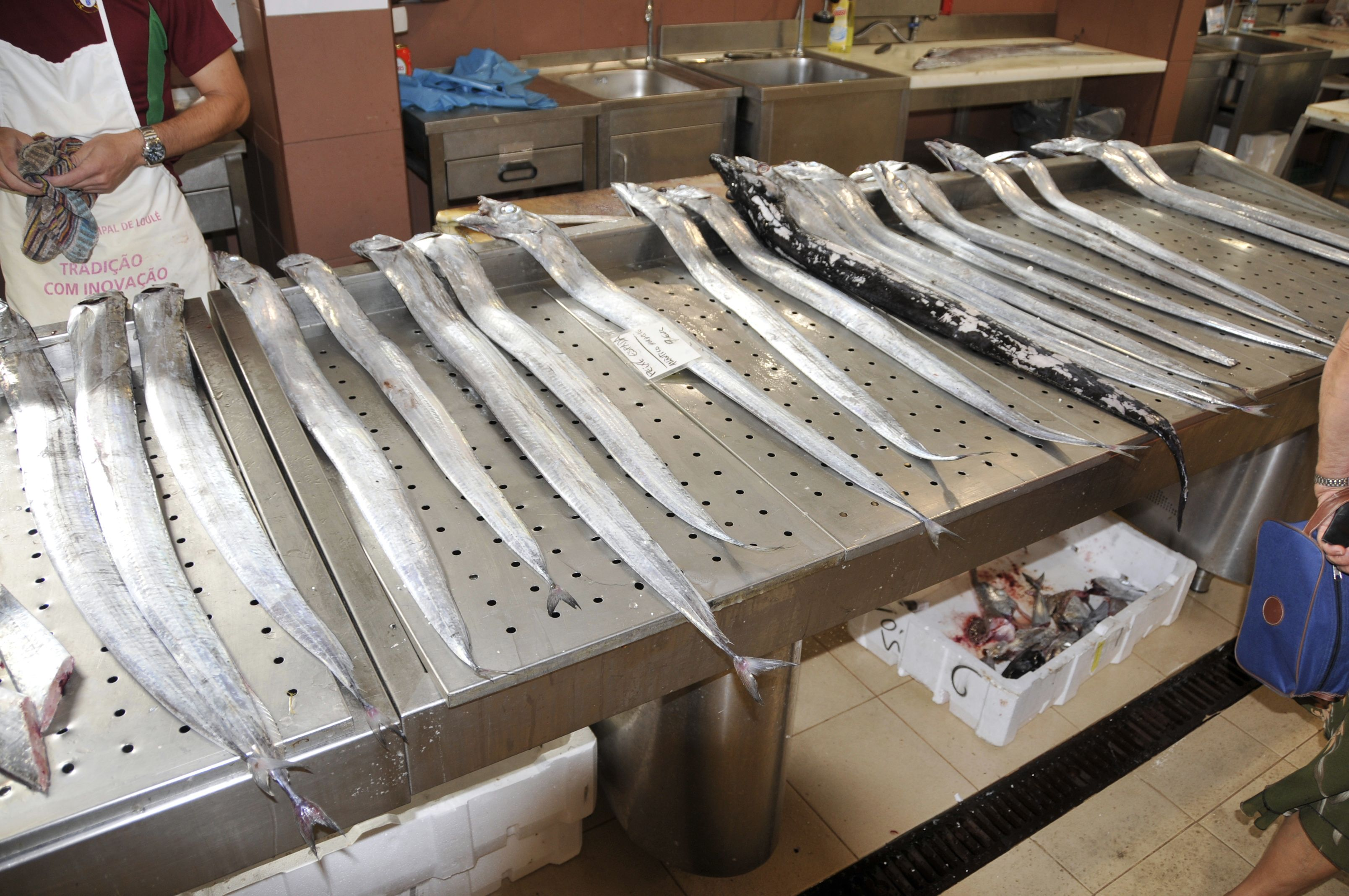 Unbekannter Fish